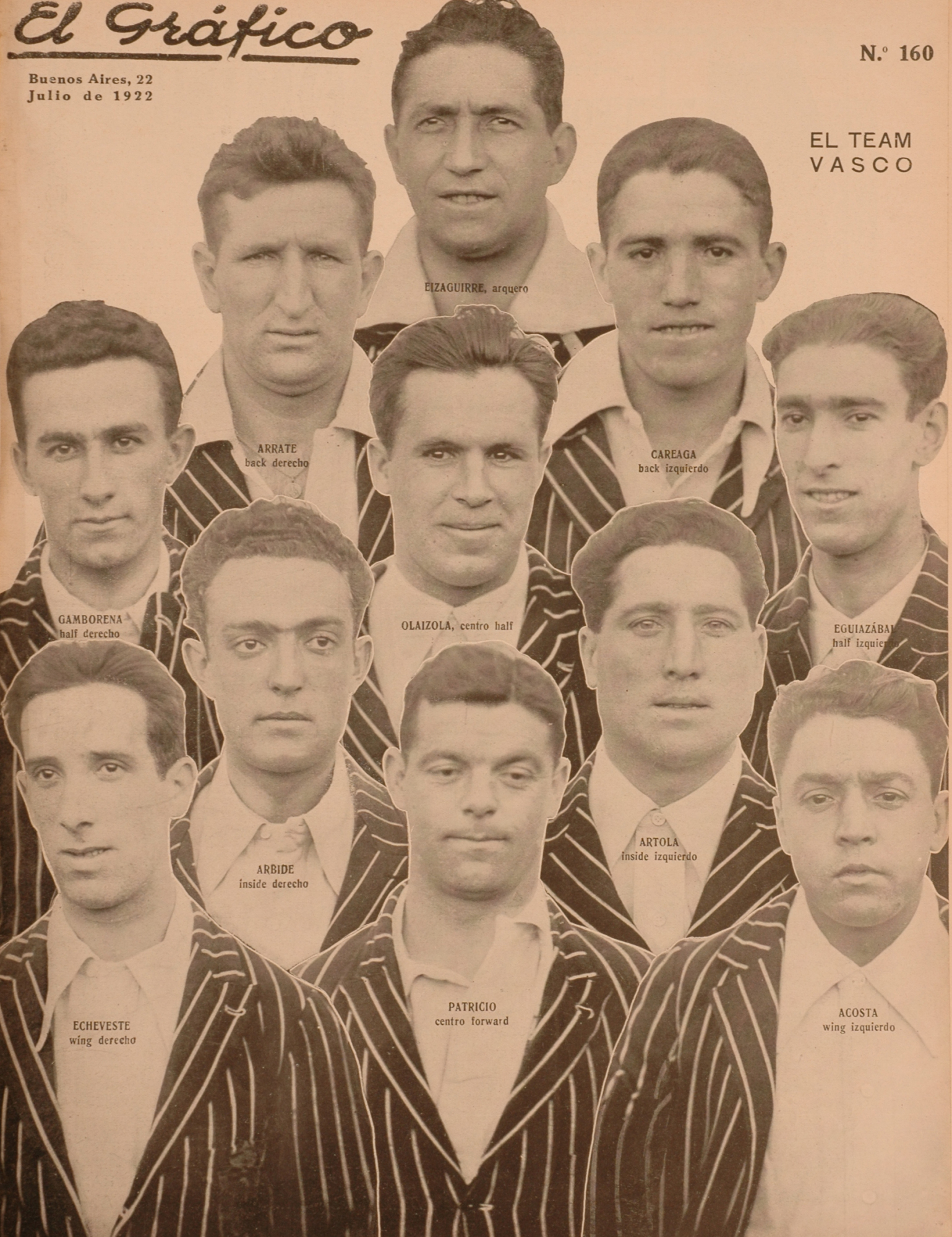 El Grafico del 22 de Julio de 1922. Edicion 160